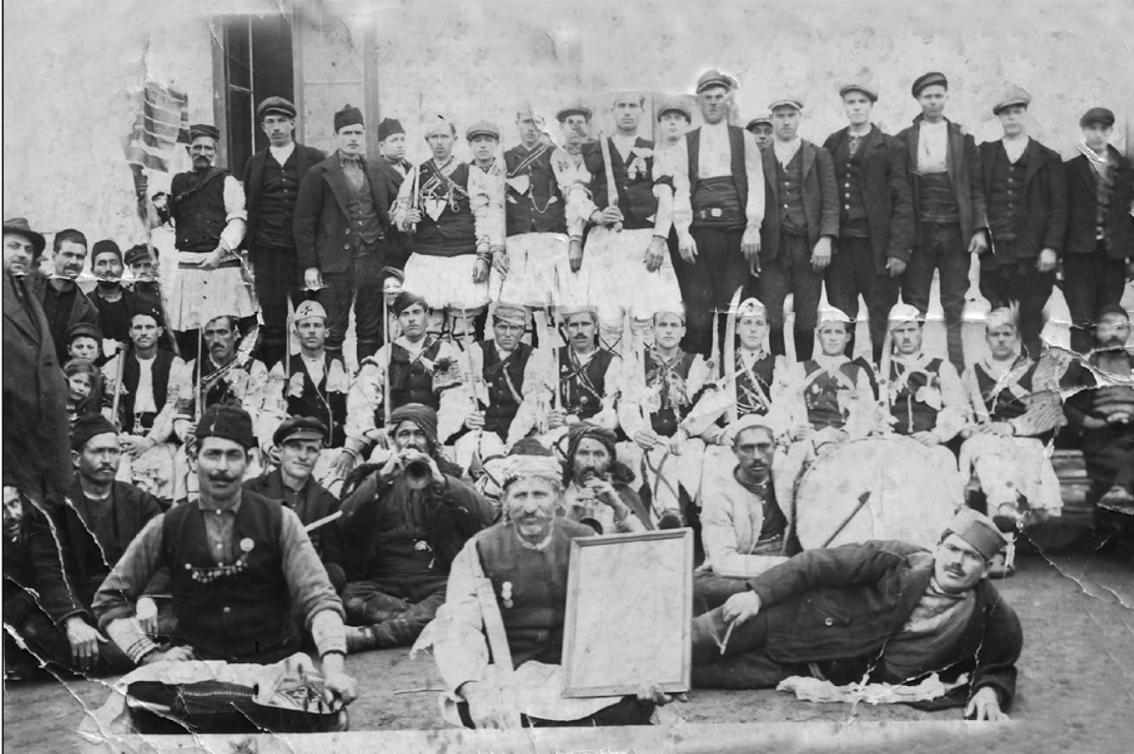 Группа русалиев. Македония